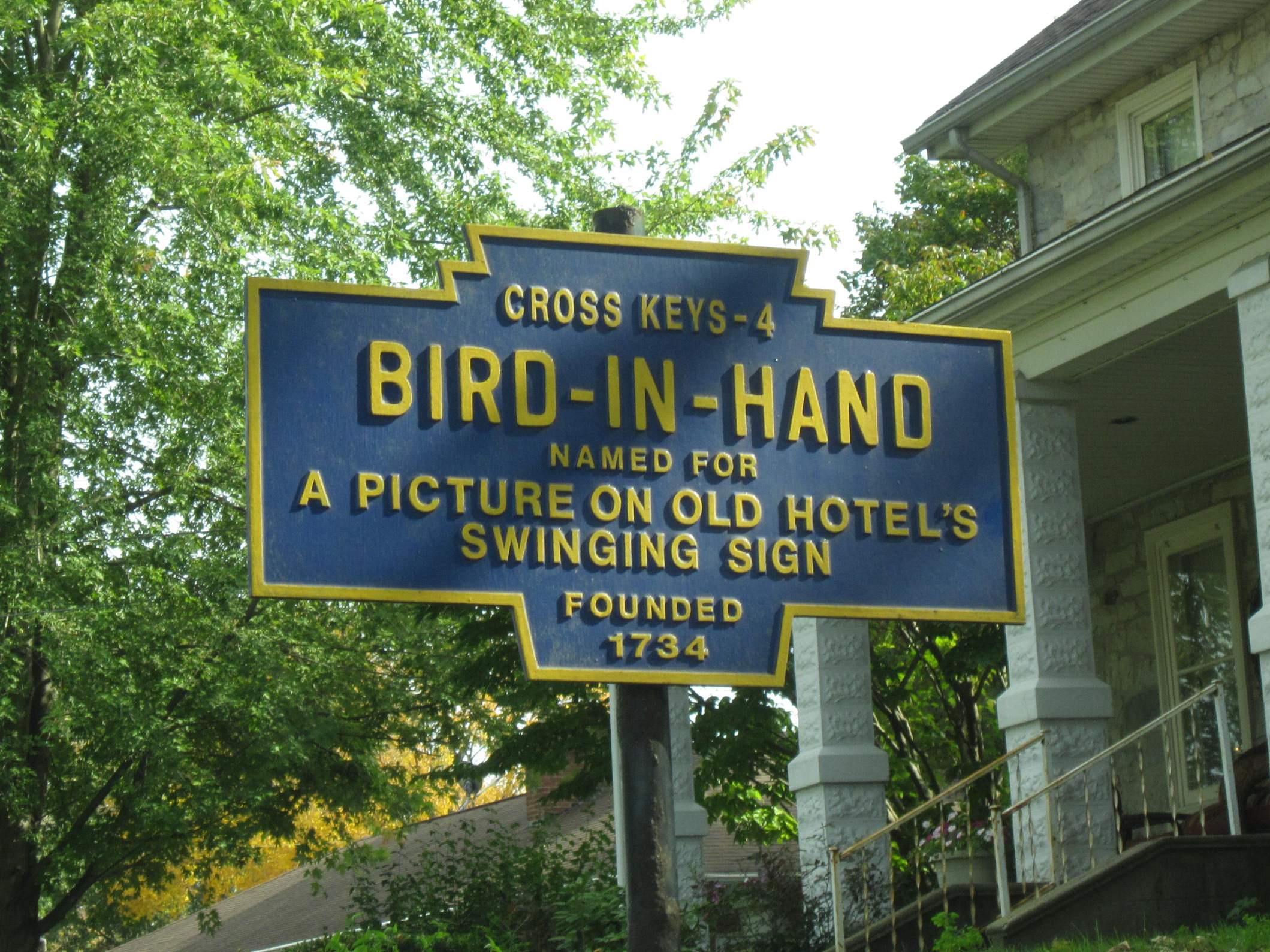 Keystone Marker for Bird-in-Hand, Pennsylvania